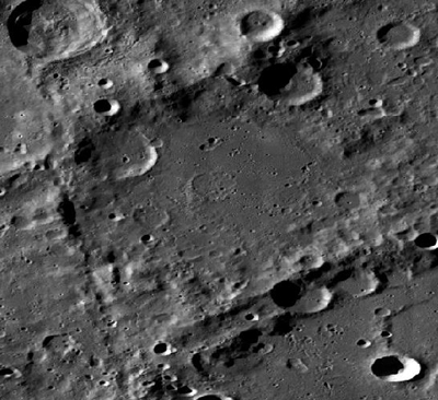 希尔德加德环形山